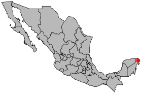 Locator map of Cancún, Quintana Roo, Mexico